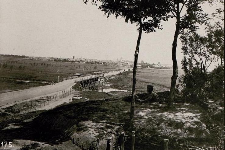 Stellungen am Styr bei Luck, Holzhauerbrücke.